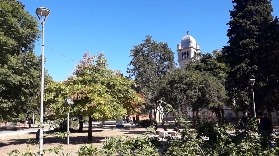 Plaza SJB FV